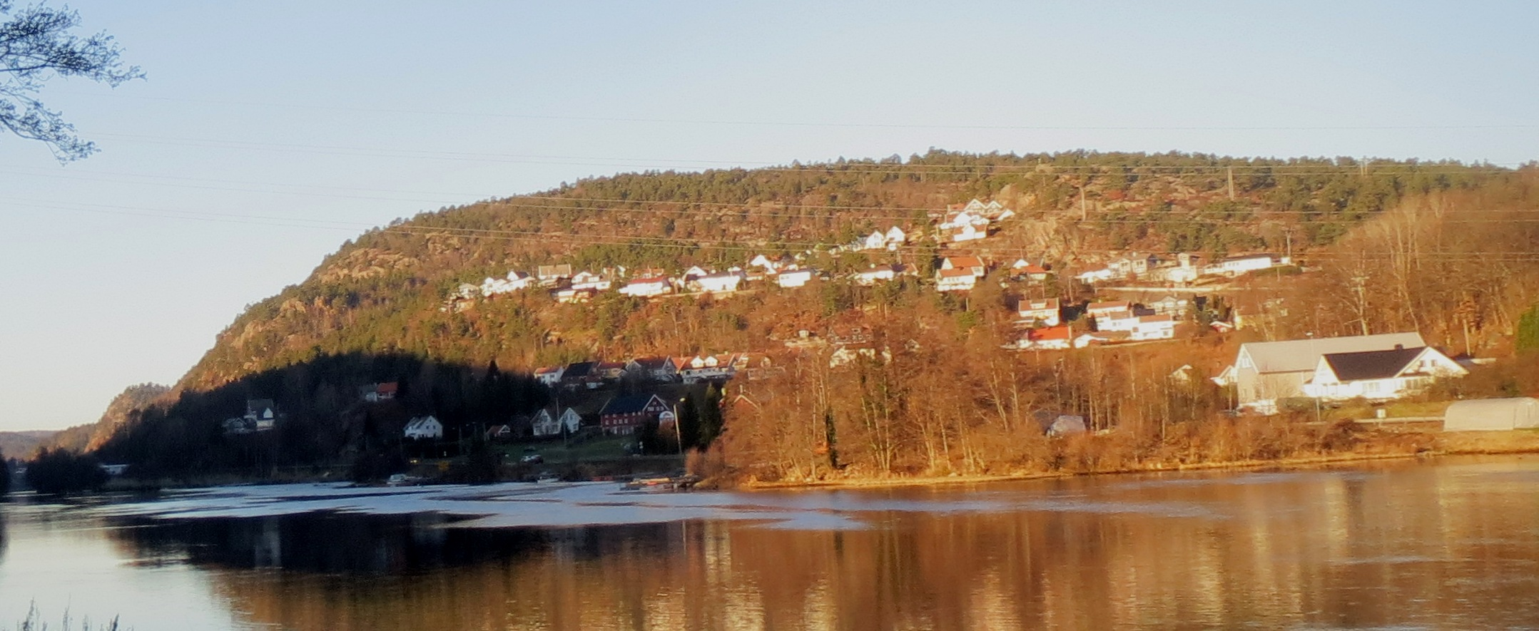 Sødal i Kristiansand, sett fra Eg.